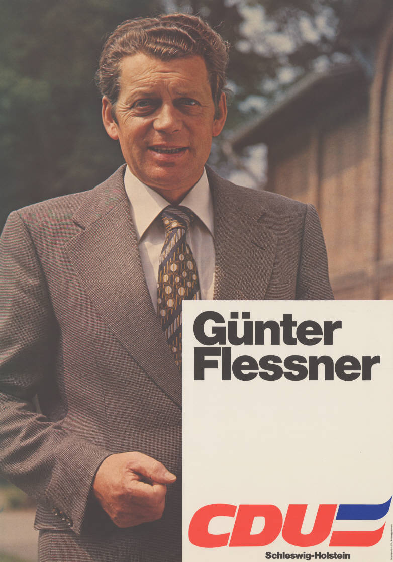 Günter Flessner CDU Schleswig-Holstein Abbildung: Foto Plakatart: Kandidaten-/Personenplakat mit Porträt Auftraggeber: Verantw.: CDU Schleswig-Holstein Objekt-Signatur: 10-012 : 426 Bestand: Landtagswahlplakate Schleswig-Holstein (10-012) GliederungBestand10-18: Landtagswahlplakate Schleswig-Holstein (10-012) » Landtagswahl am 29.4.1979 » Ankündigungsplakate Lizenz: KAS/ACDP 10-012 : 426 CC-BY-SA 3.0 DE